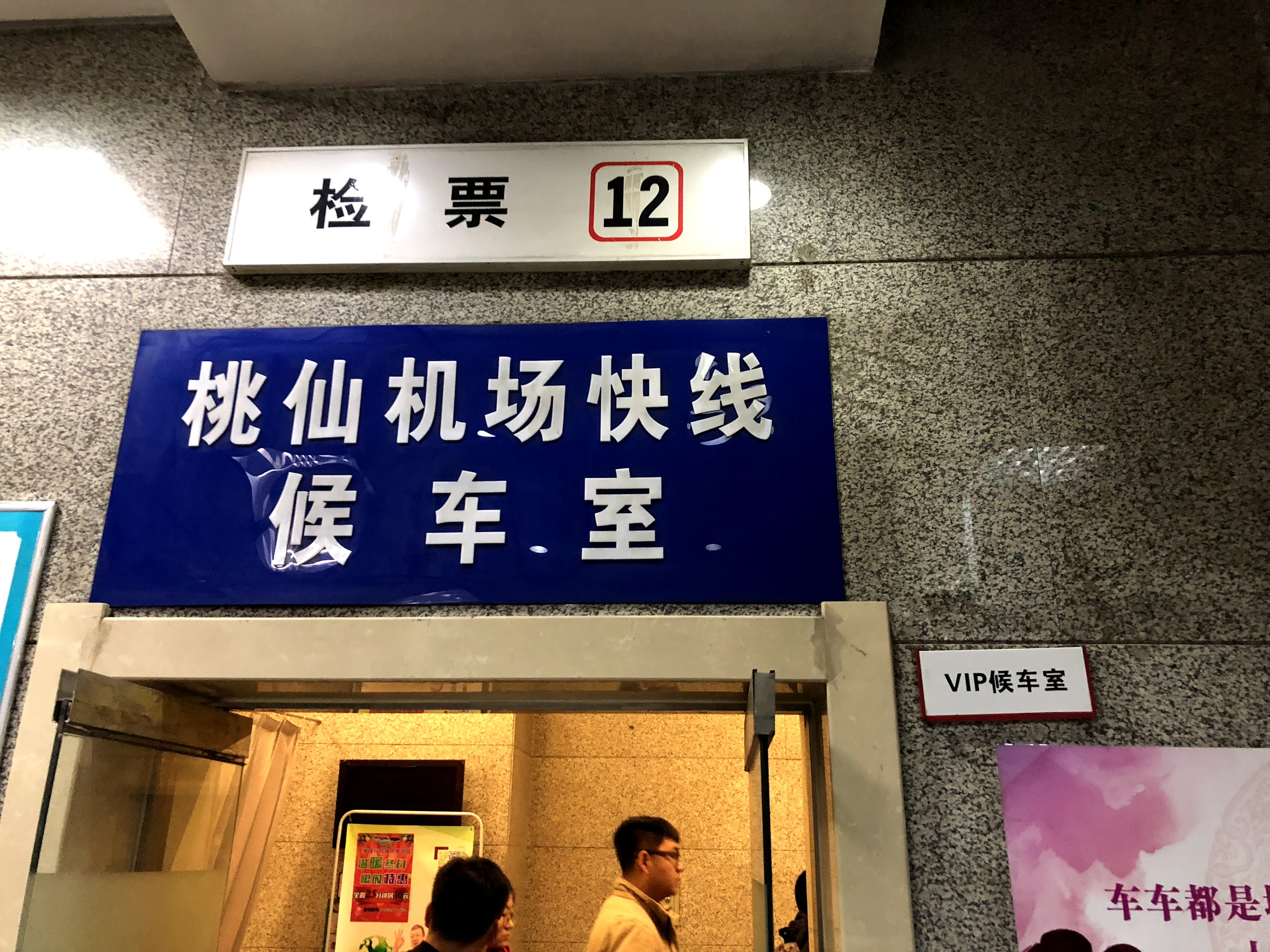 沈阳 SK 客运站桃仙机场快线候车室